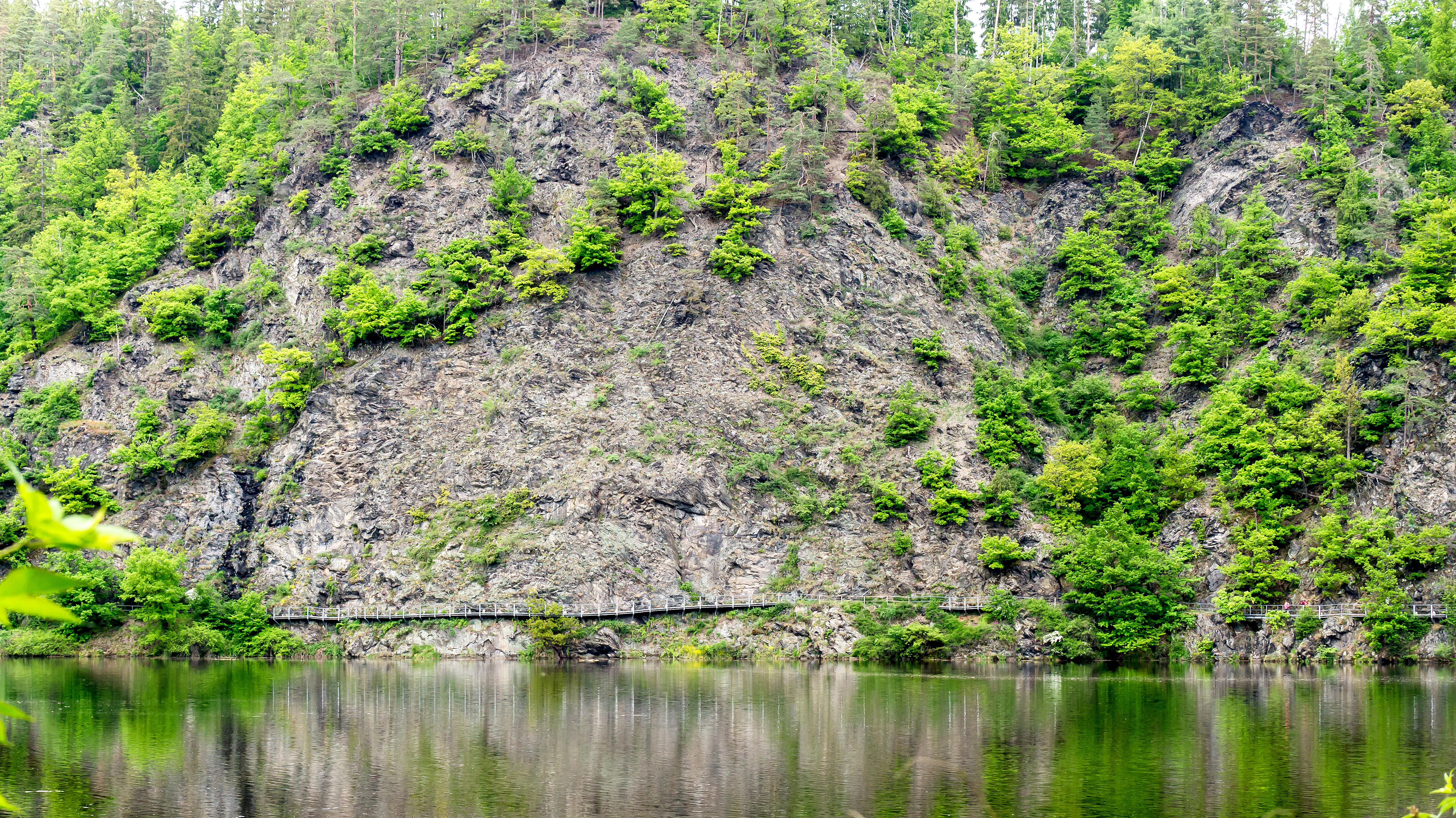 Silikatfelsen mit Felsspaltenvegetation im Naturschutzgebiet „Kobersfelsen“ in Burgk (Thüringen); auch gelegen im FFH-Gebiet „Burgk-Bleiberg-Kobersfelsen“ und im Landschaftsschutzgebiet „Obere Saale“; LXXXIII